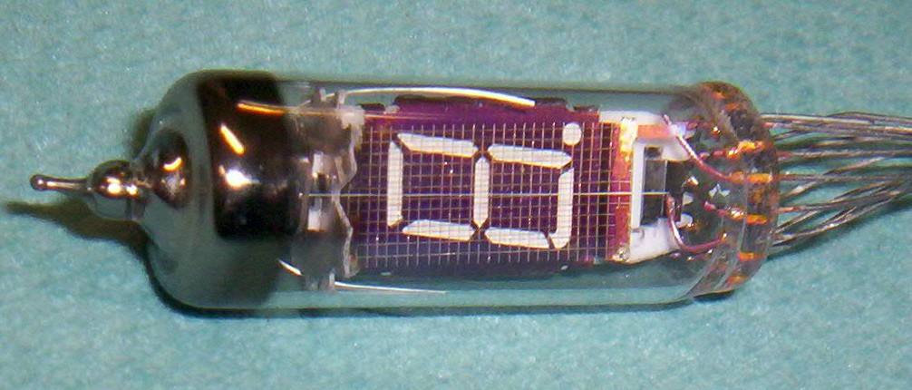 Vakuum-Fluoreszenzanzeigeröhre (Typ ИВ-6, Sowjetunion 1978, Ziffernhöhe 12mm.